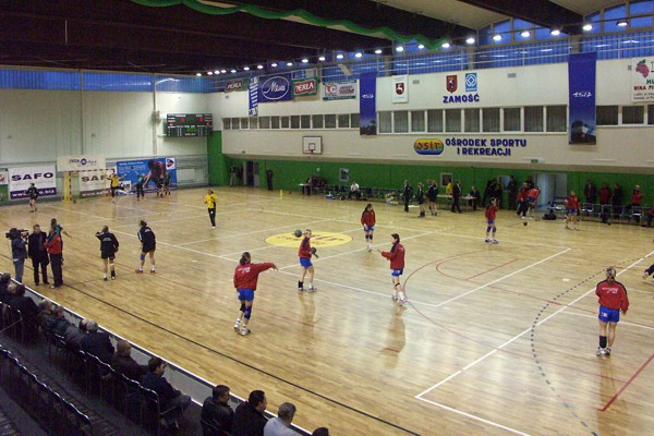 Otwarcie po remoncie hali widowiskowo-sportowej OSiR w Zamościu